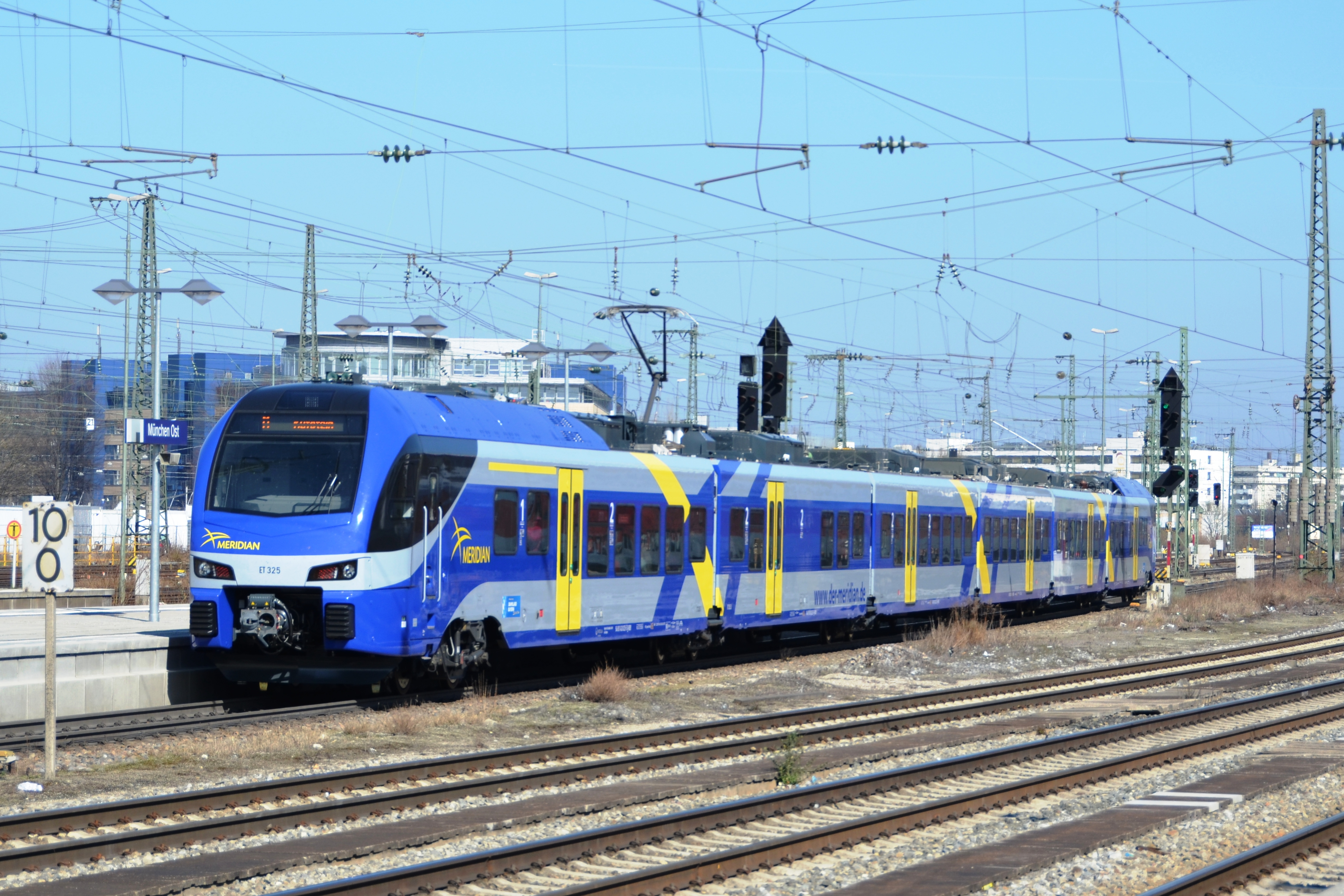 ET 325 Meridian Munich Hbf - Salzburg @ Munich Ost 09.03.14